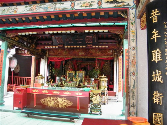 达濠巡司埠双忠古庙内景 2009.8.3